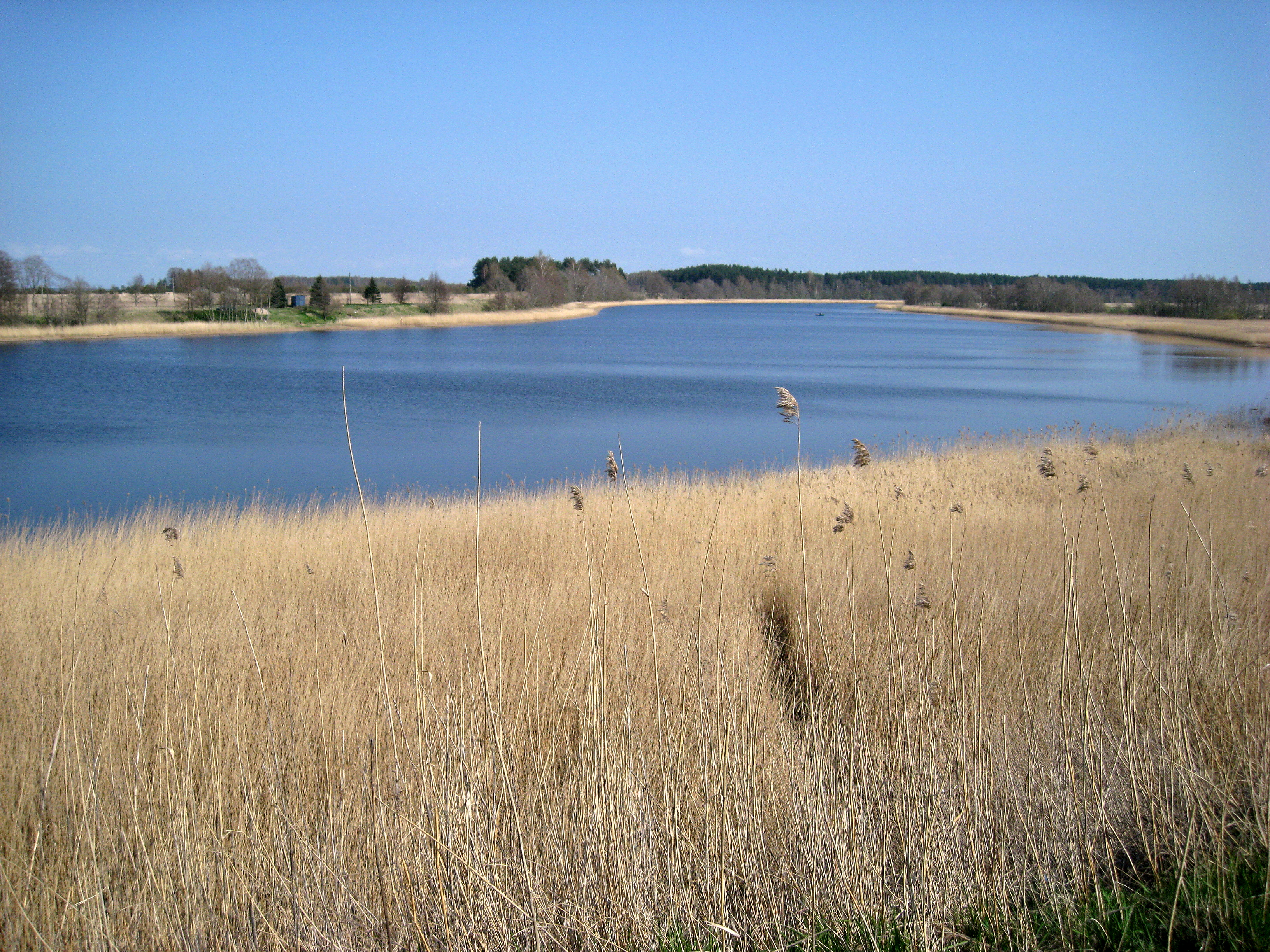 Venta pie Vārves